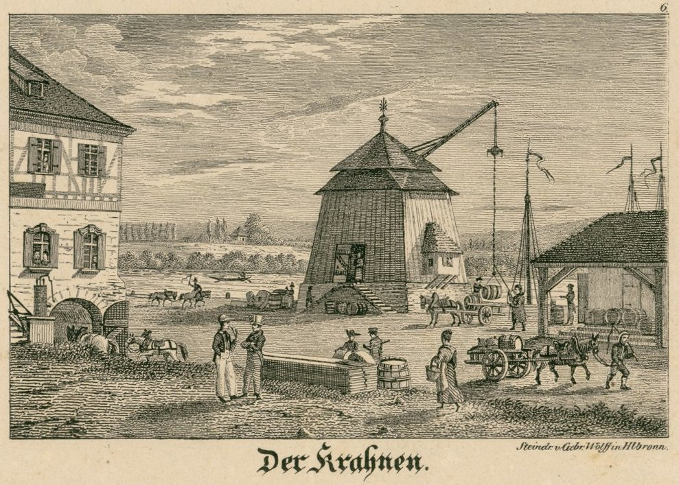 Ansicht Der Krahnen (Alter Kranen von Heilbronn). Aus der Bilderserie Erinnerungen an Heilbronn, Nr. 6